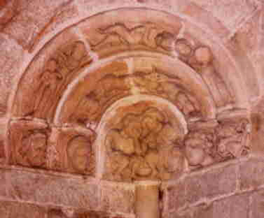 Trompas romanicas.